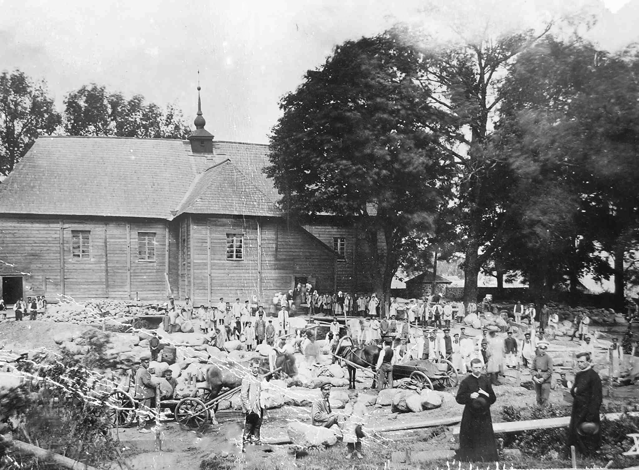 Беларуская (тарашкевіца): Дуброва Гарадзенская (Dubrova Haradzienskaja). Стары касьцёл Сьвятога Станіслава часоў Вялікага Княства Літоўскага